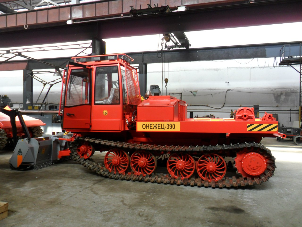 Тракторы Онежец-390 на ОТЗ